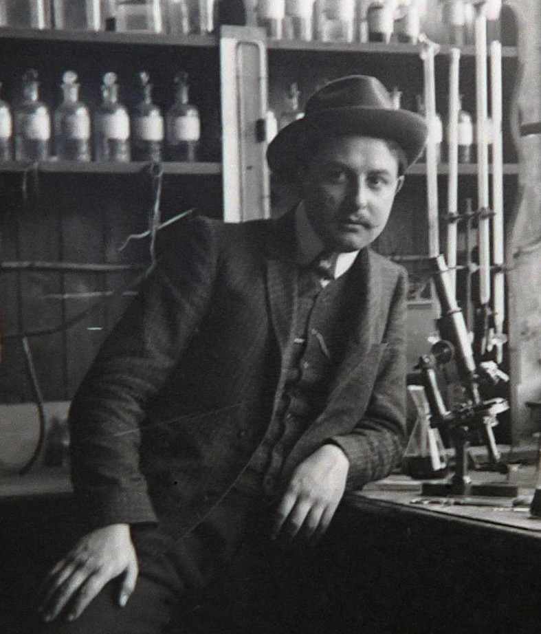 Maurice de Keghel (Gand 1883 - Montmorency 1965), chimiste et industriel